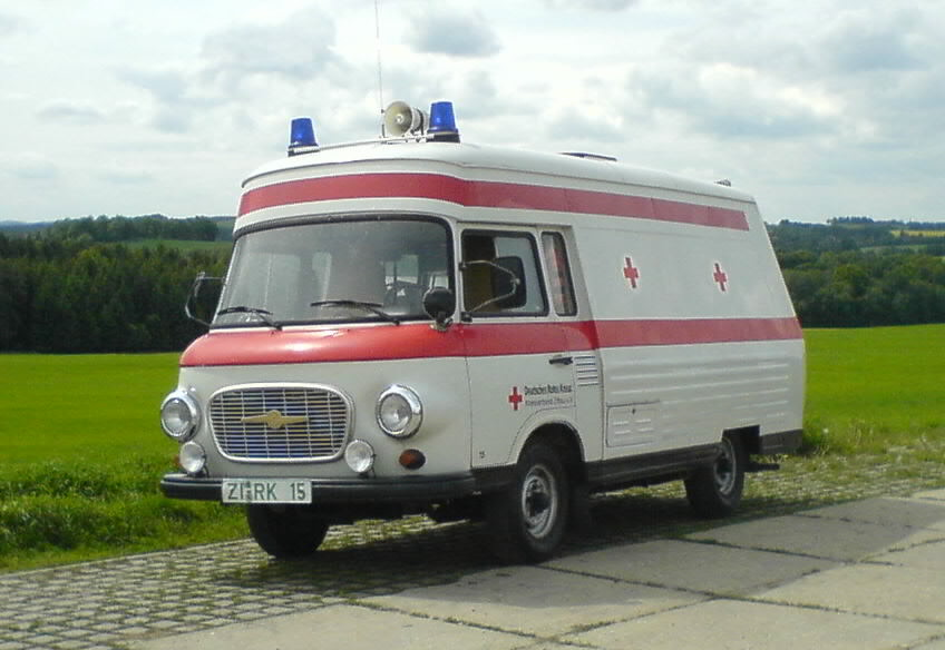 Barkas B 1000 der Schnellen Medizinische Hilfe, Variante SMH 3